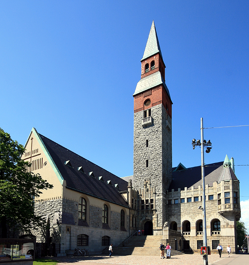 National Museum, Finland. Mannerheimintie 34, Helsinki. Built 1910. Architects: Herman Gesellius, Armas Lindgren and Eliel Saarinen.